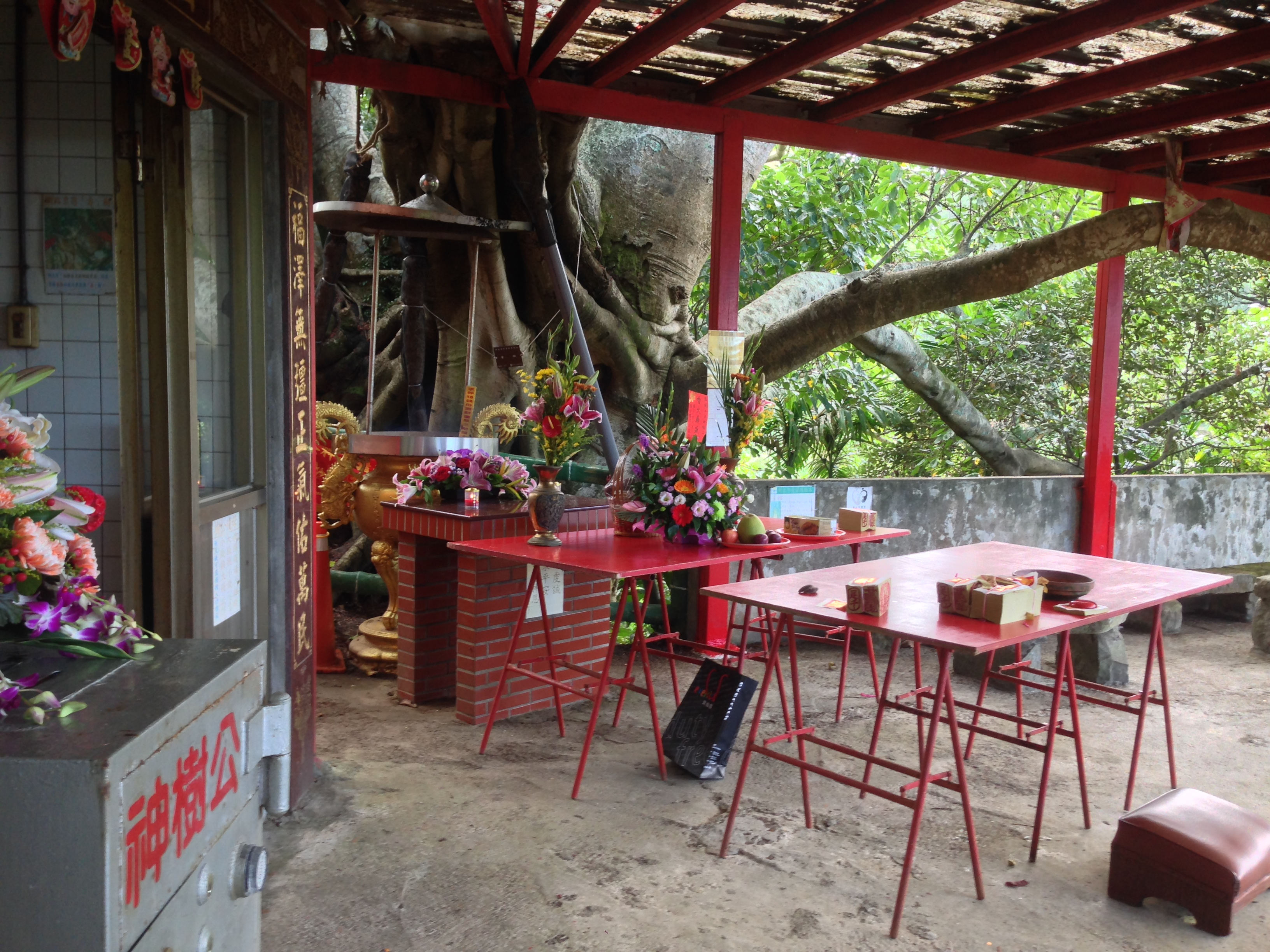 千年神豬樹公祀桌